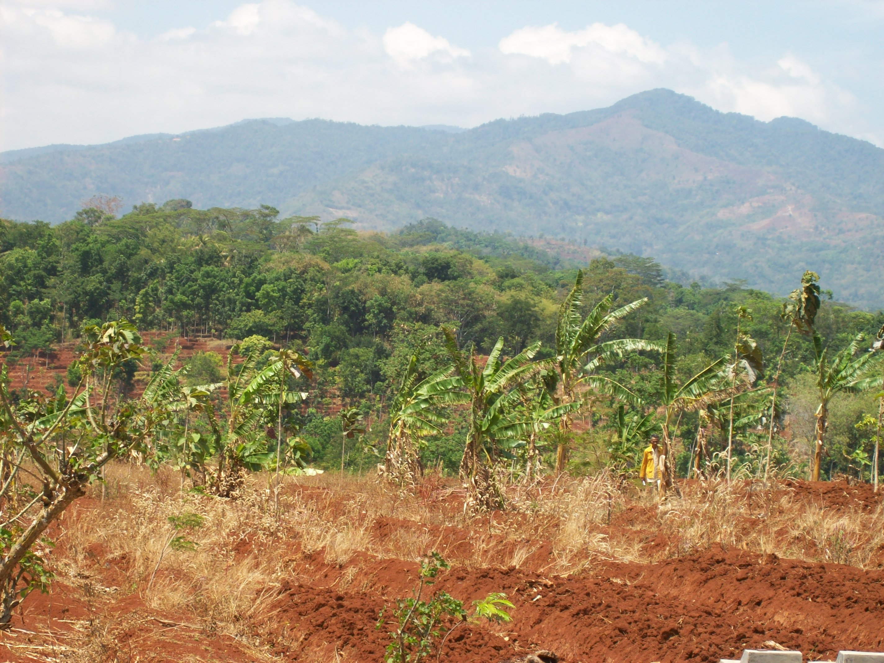 Gunung Lingga from Cisasak - Situraja